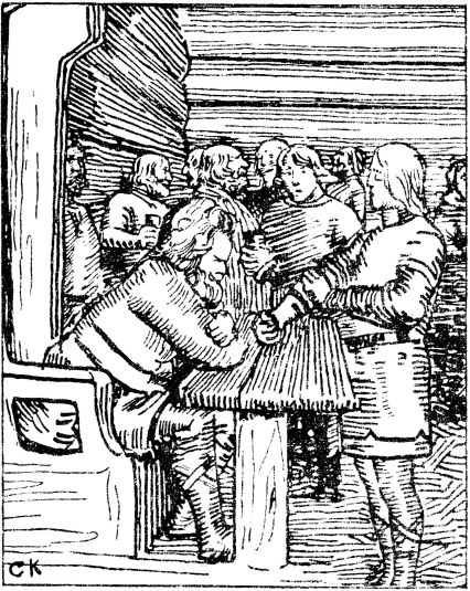 Christian Krohg: Illustration for Olav den helliges saga, Heimskringla 1899-edition. nn: «Tore syner kong Olav ringen frå kong Knut.»